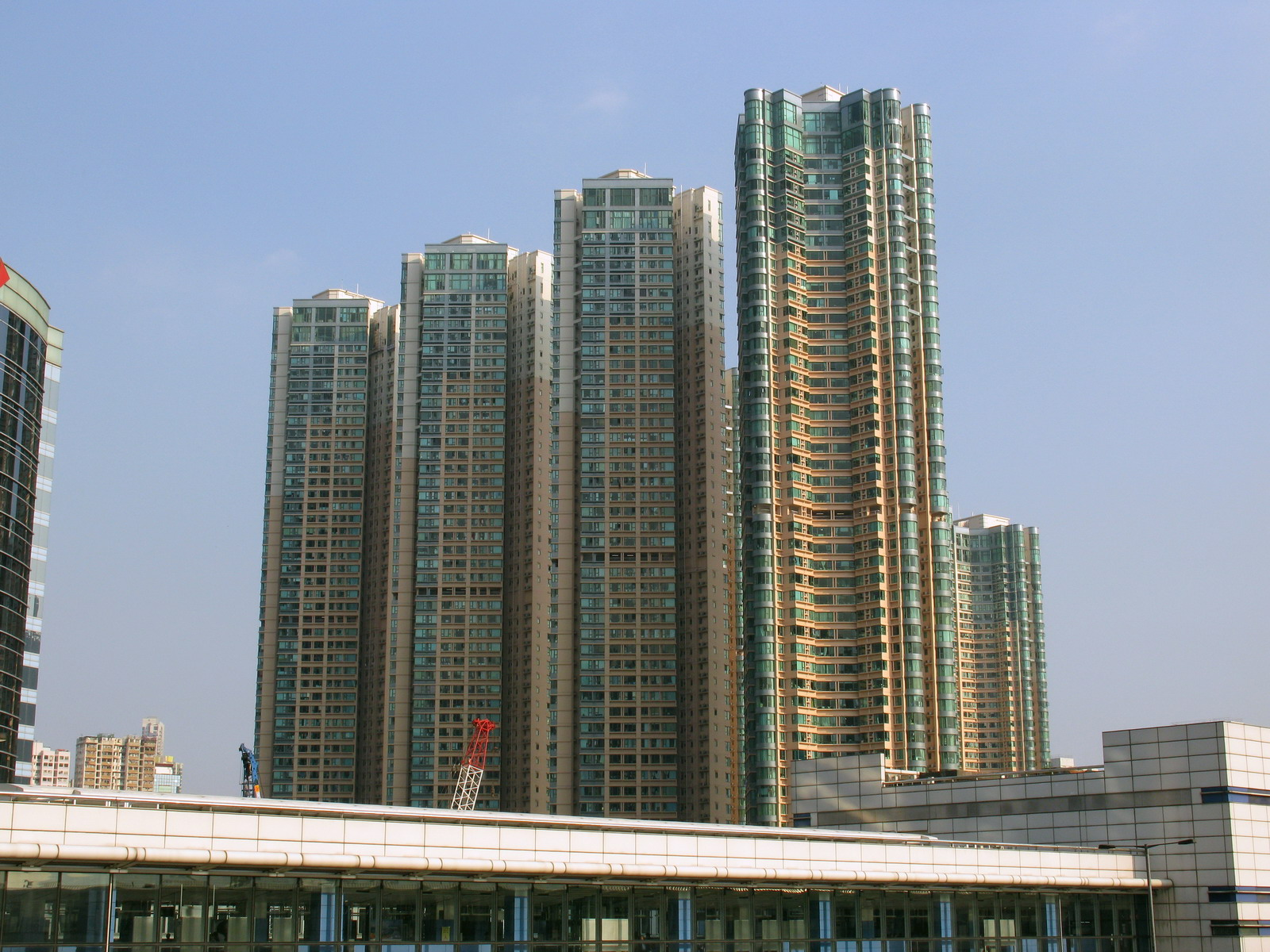 大角咀-帝柏海灣 Central Park, Tai Kok Tsui